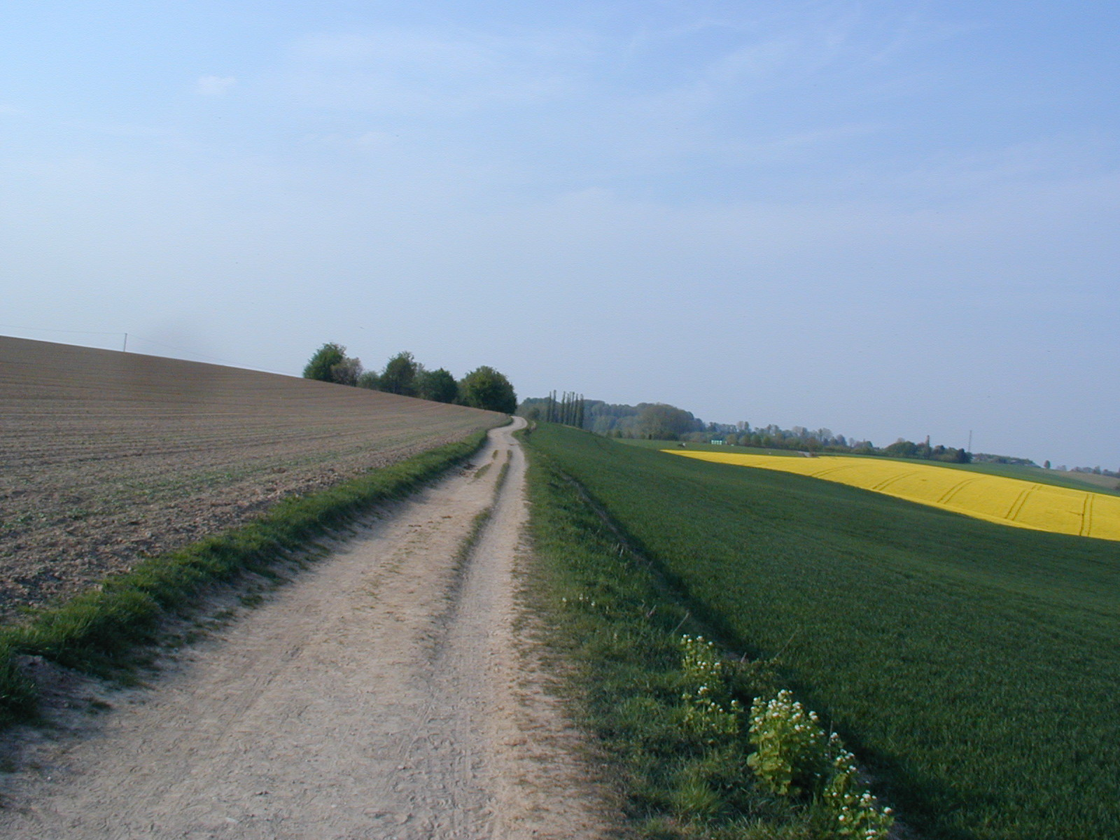 Erkrath, Alte Kölnische Straße (2) zwischen der Stindermühle und dem Kißberg